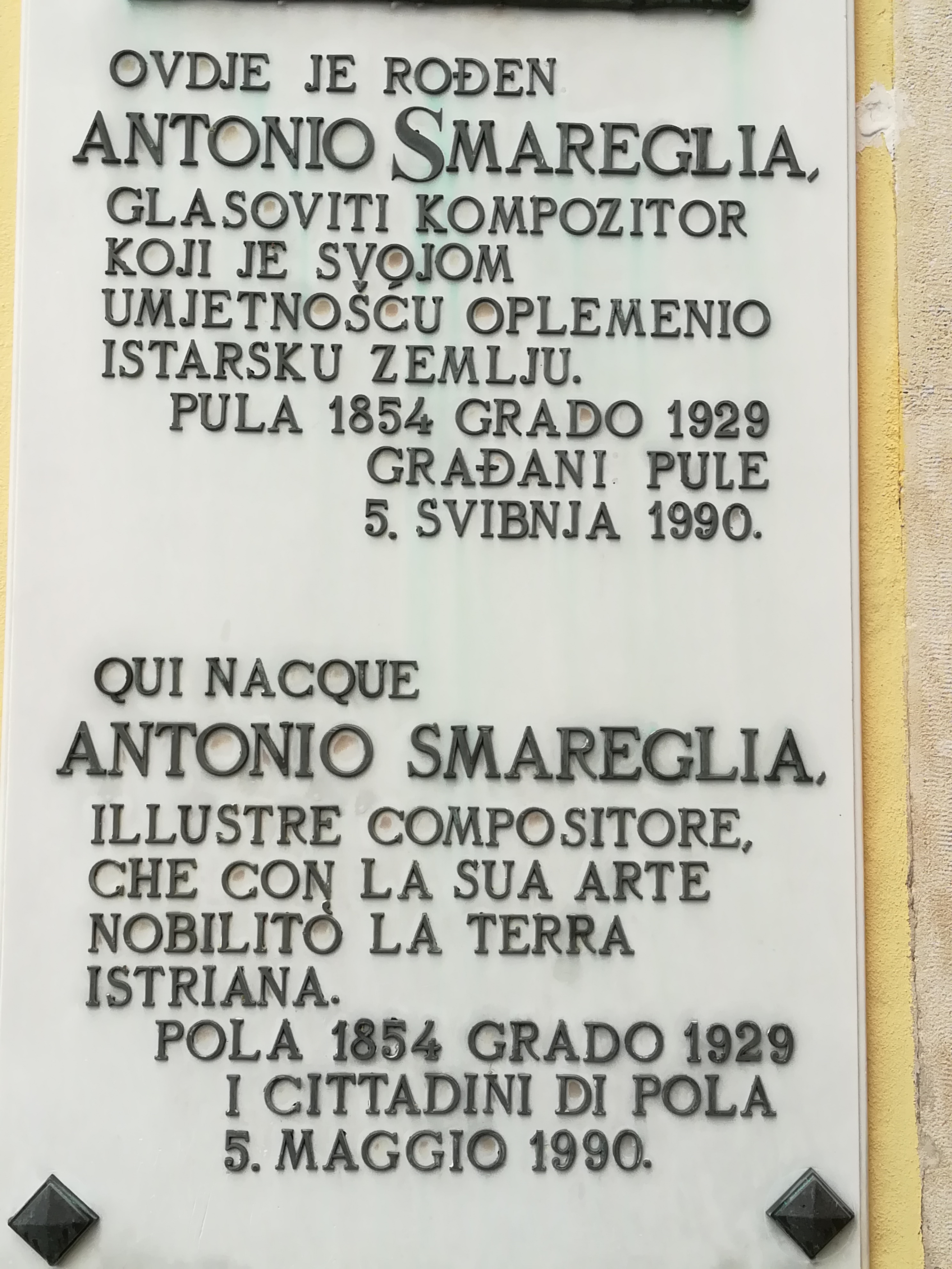 Memoriale a Pola: "Qui nasce Antonio Smareglia, illustre compositore, che con la sua arte nobilitò la terra istriana. Pola 1854 Grado 1929 I cittadini di Pola 5 maggio 1990